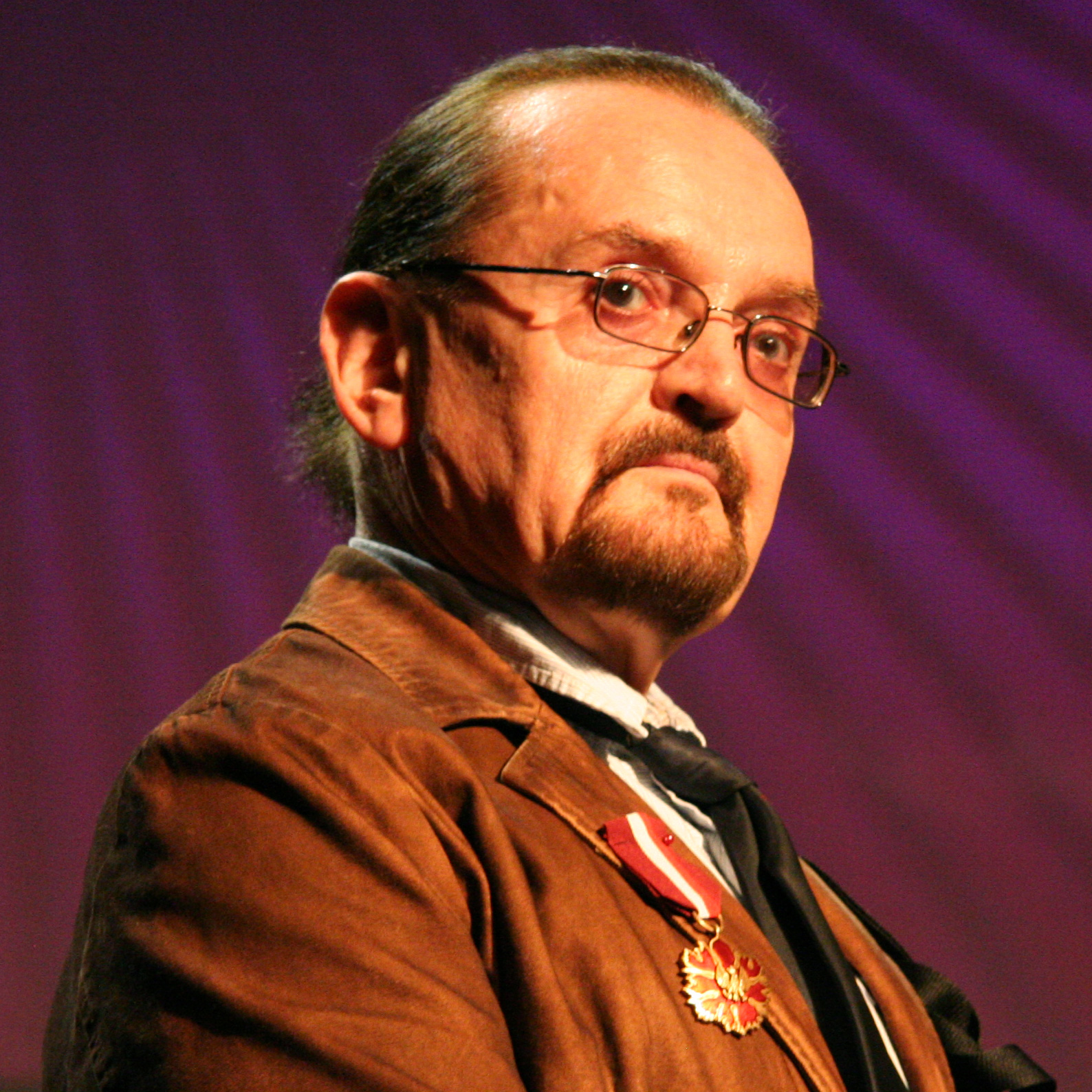 Bogusław Polch odznaczony Brązowym Medalem "Zasłużony Kulturze Gloria Artis" podczas gali wręczenia nagród 20. Międzynarodowego Festiwalu Komiksu i Gier w Łodzi.